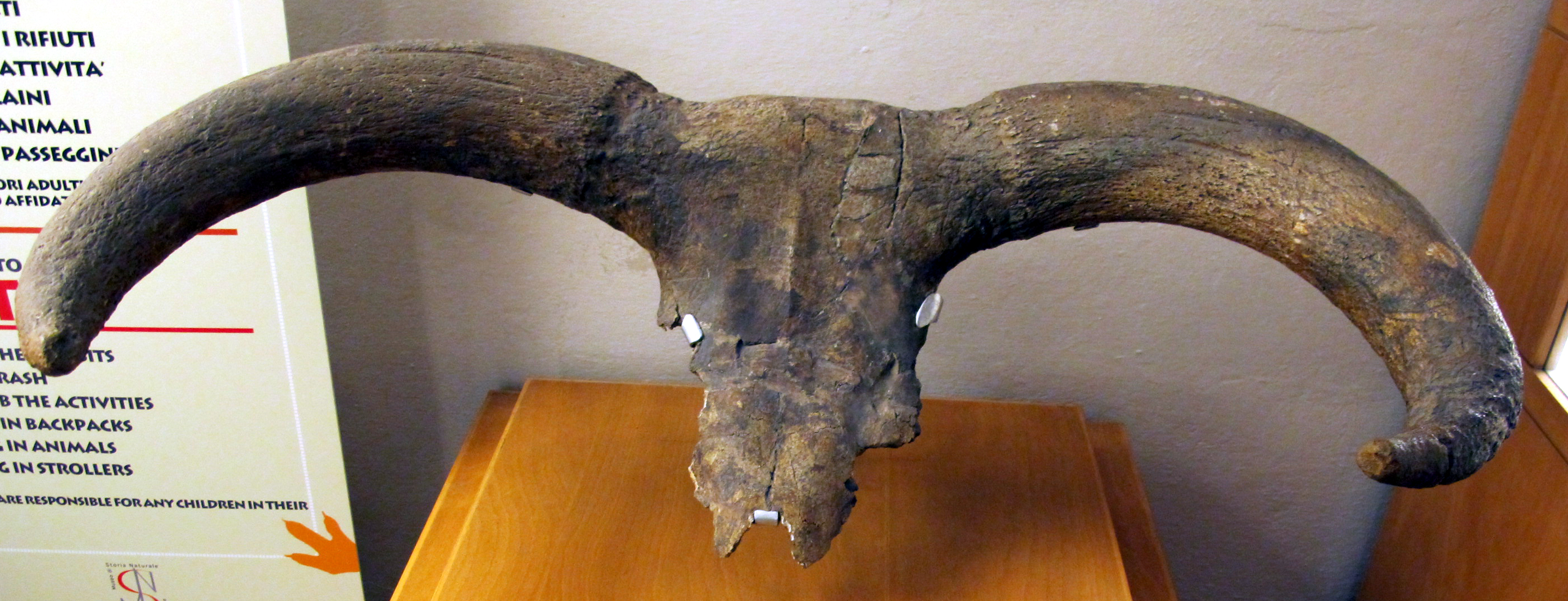 Museo di paleologia, cranio di bos primigenius, da bucine, valdarno superiore